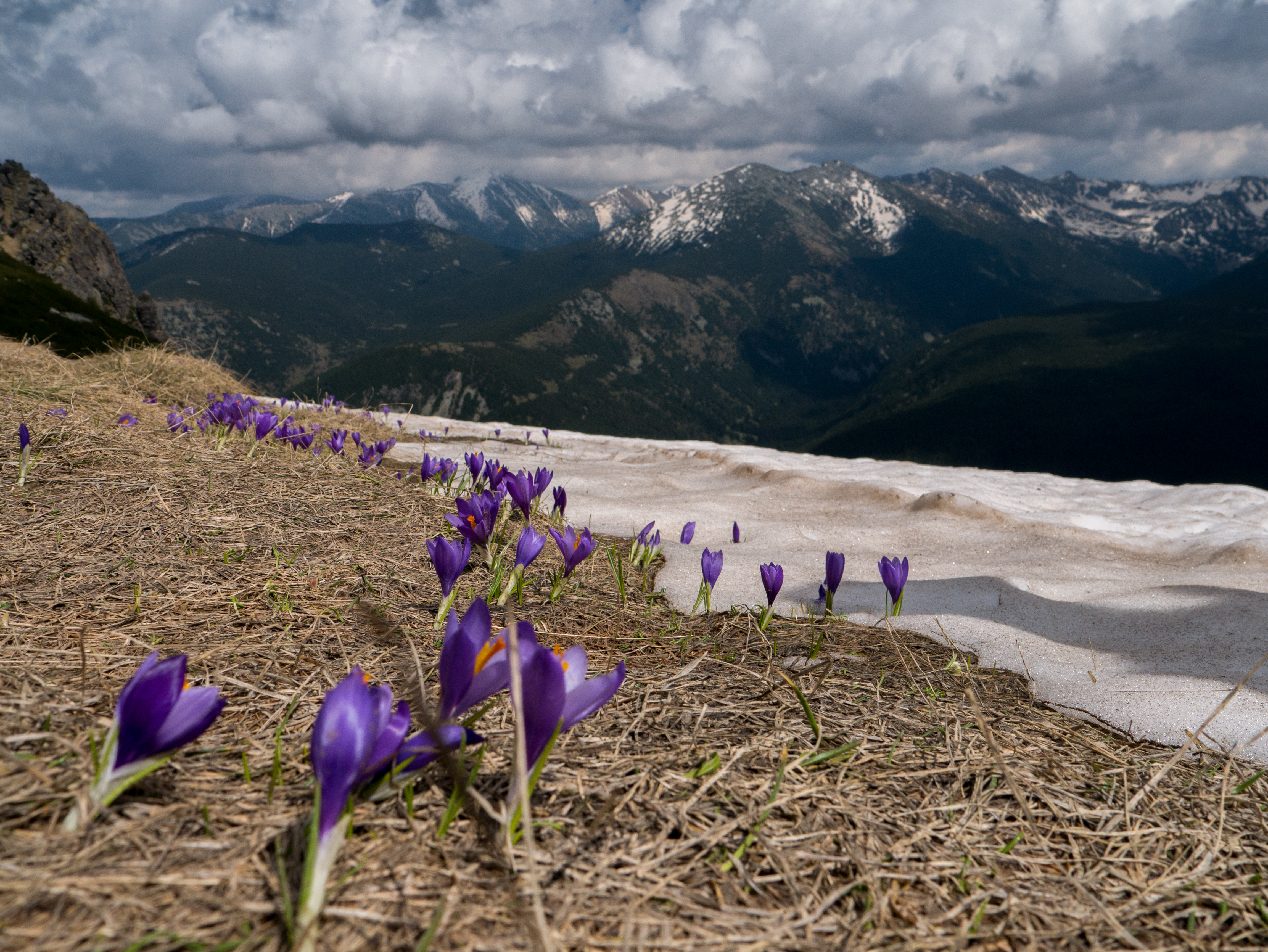 Рила, Рила Изглед към връх Мусала на изкачване към връх Мечит